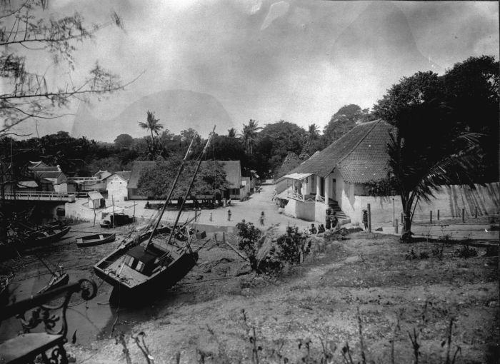 Foto. Foto is genomen tijdens de Tweede Zuid Nieuw-Guinea Expeditie. Havengezicht, Koepang